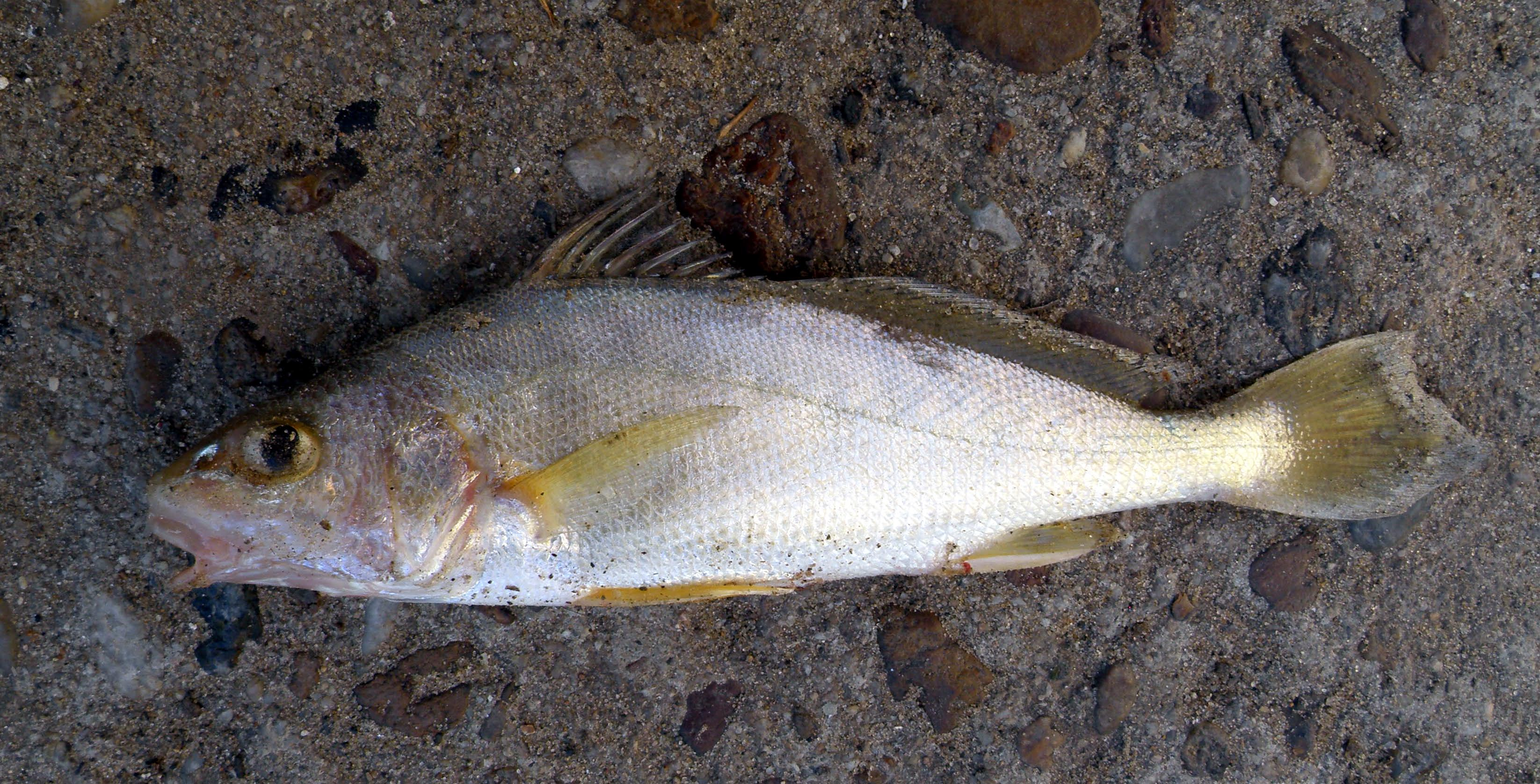 Corvina de río (Pachyurus bonariensis) en la ribera del Río de la Plata.